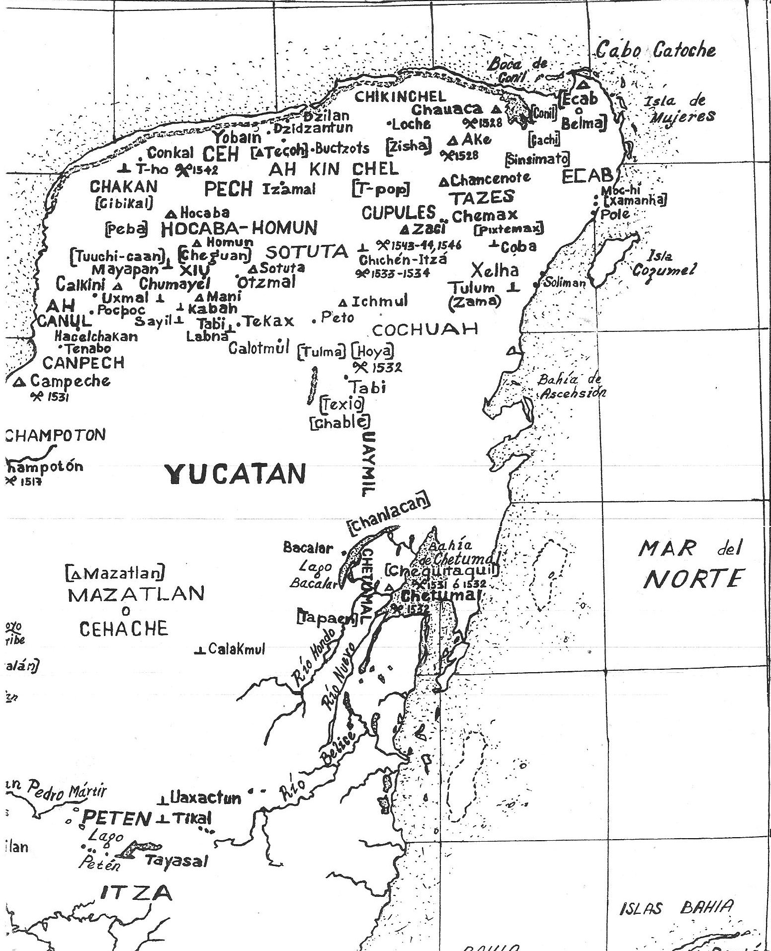 Mapa sobre las ciudades mayas en la península de Yucatán